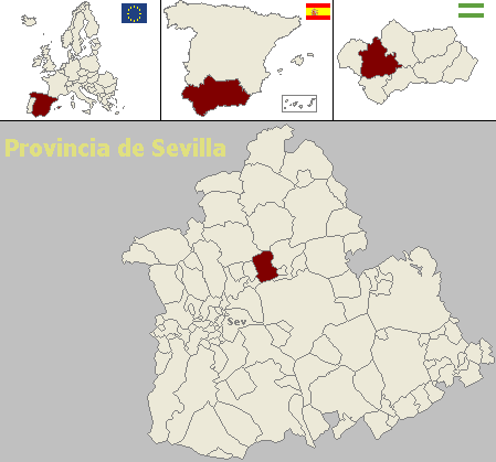 Mapa de localización del municipio sevillano de Cantillana (Andalucía, España)